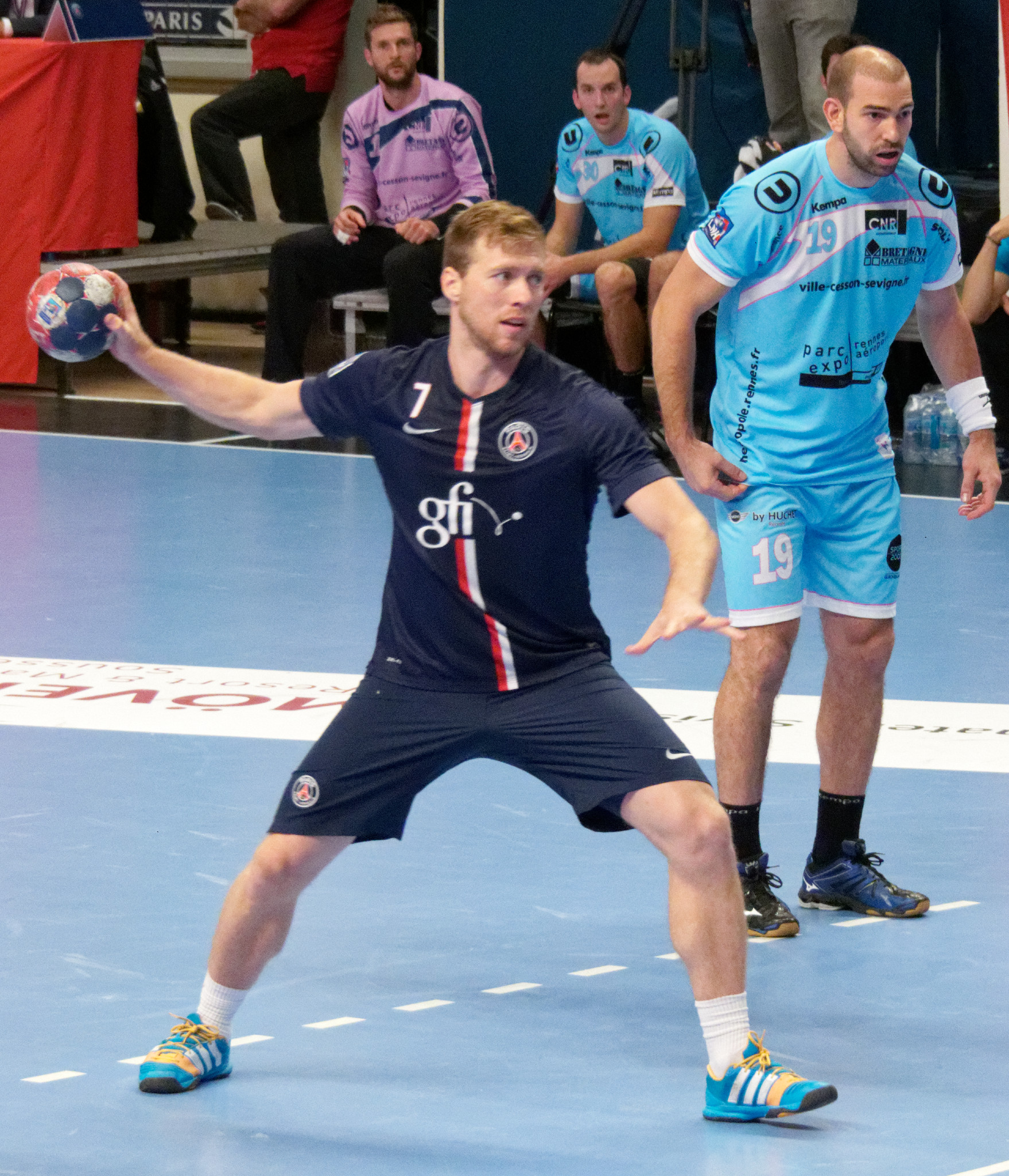 Match de championnat de LNH entre le PSG Handball et Cesson-Rennes. A Coubertin, le 24 septembre 2014.